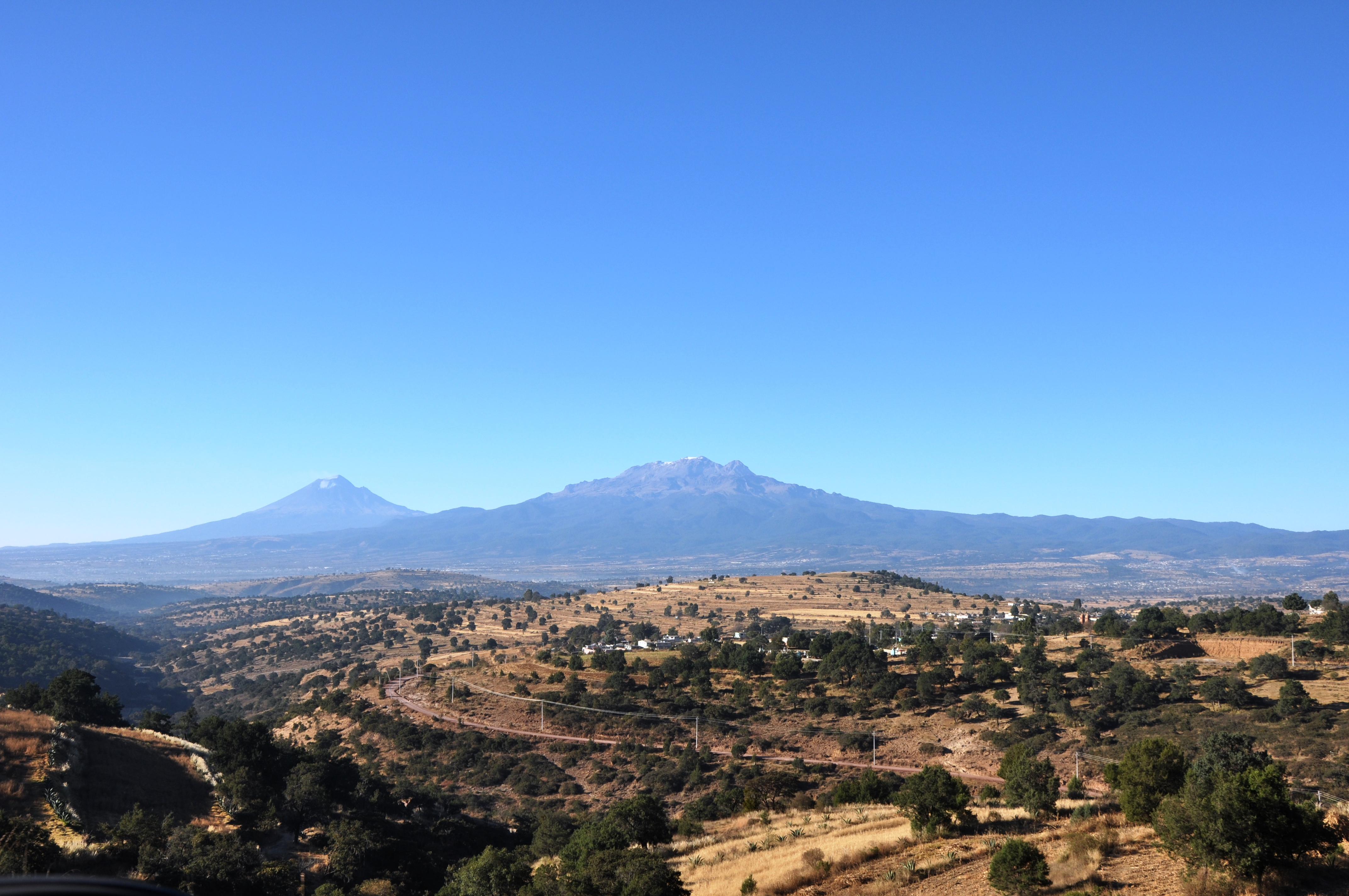 Popo e Izta desde el Arco Norte